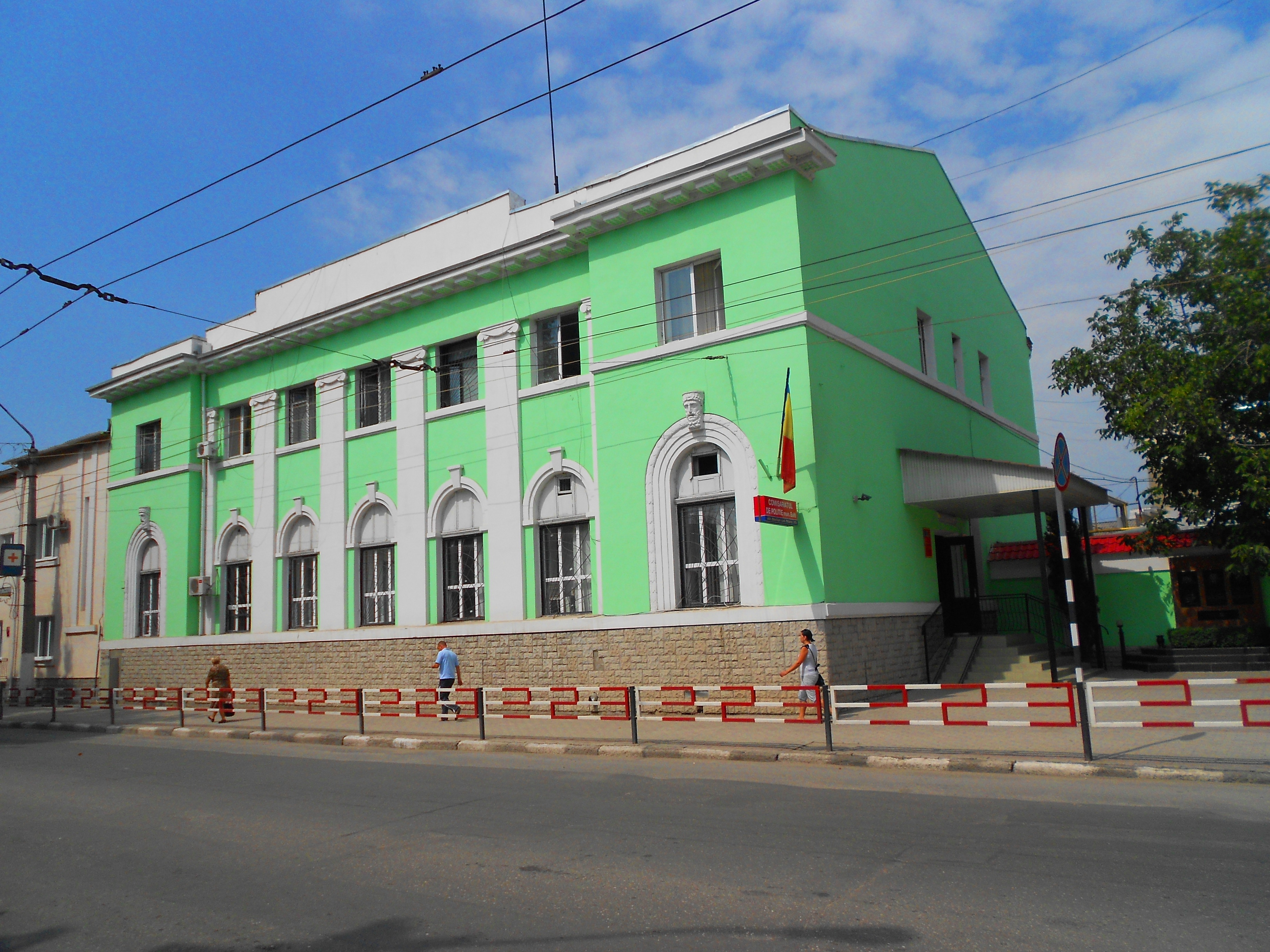 Comisariatul de Poliție din municpiul Bălți